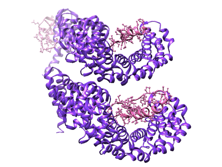 Complejo beta catenina/E-cadherina. Imagen hecha en el visualizador Chimera, pdb 1i7x.